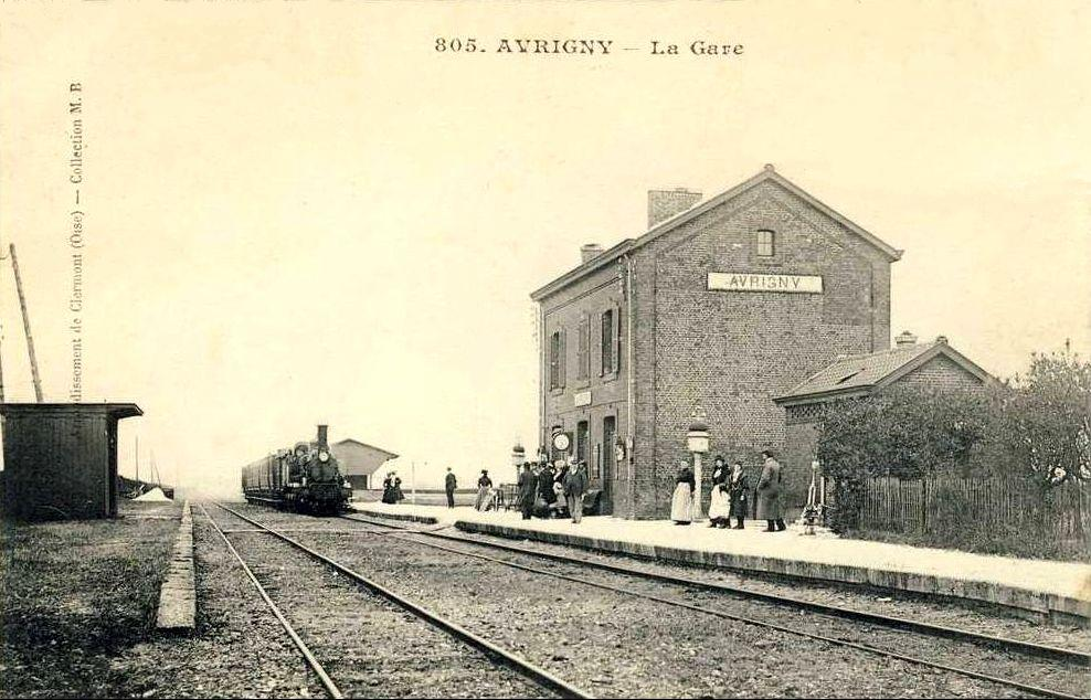 Train de voyageurs arrivant en gare.